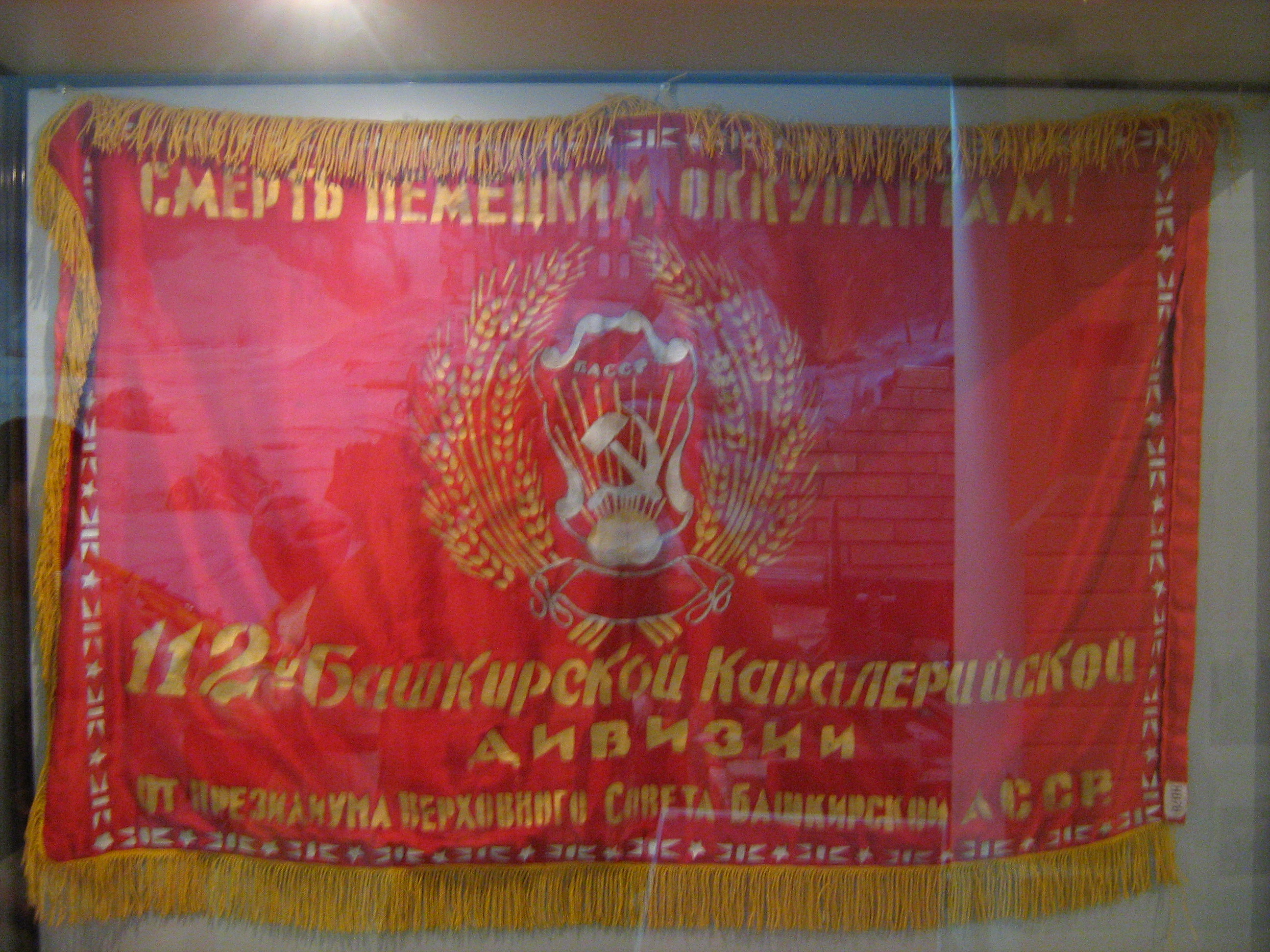 Знамя Башкавдивизии